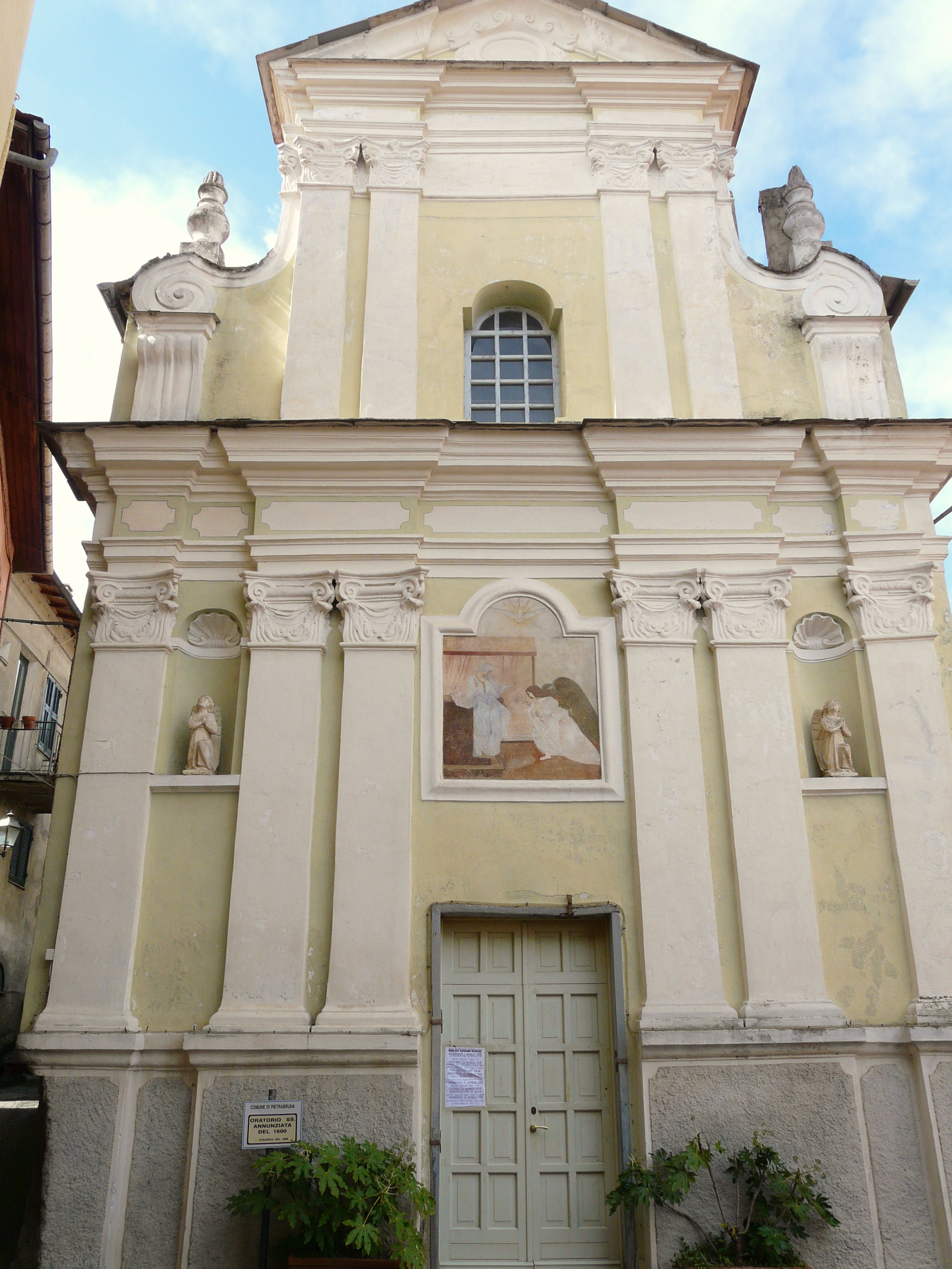 Oratorio della Santissima Annunziata, Pietrabruna, Liguria, Italia